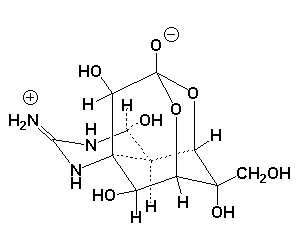 Structure diagram of tetrodotoxin molecule. [1]